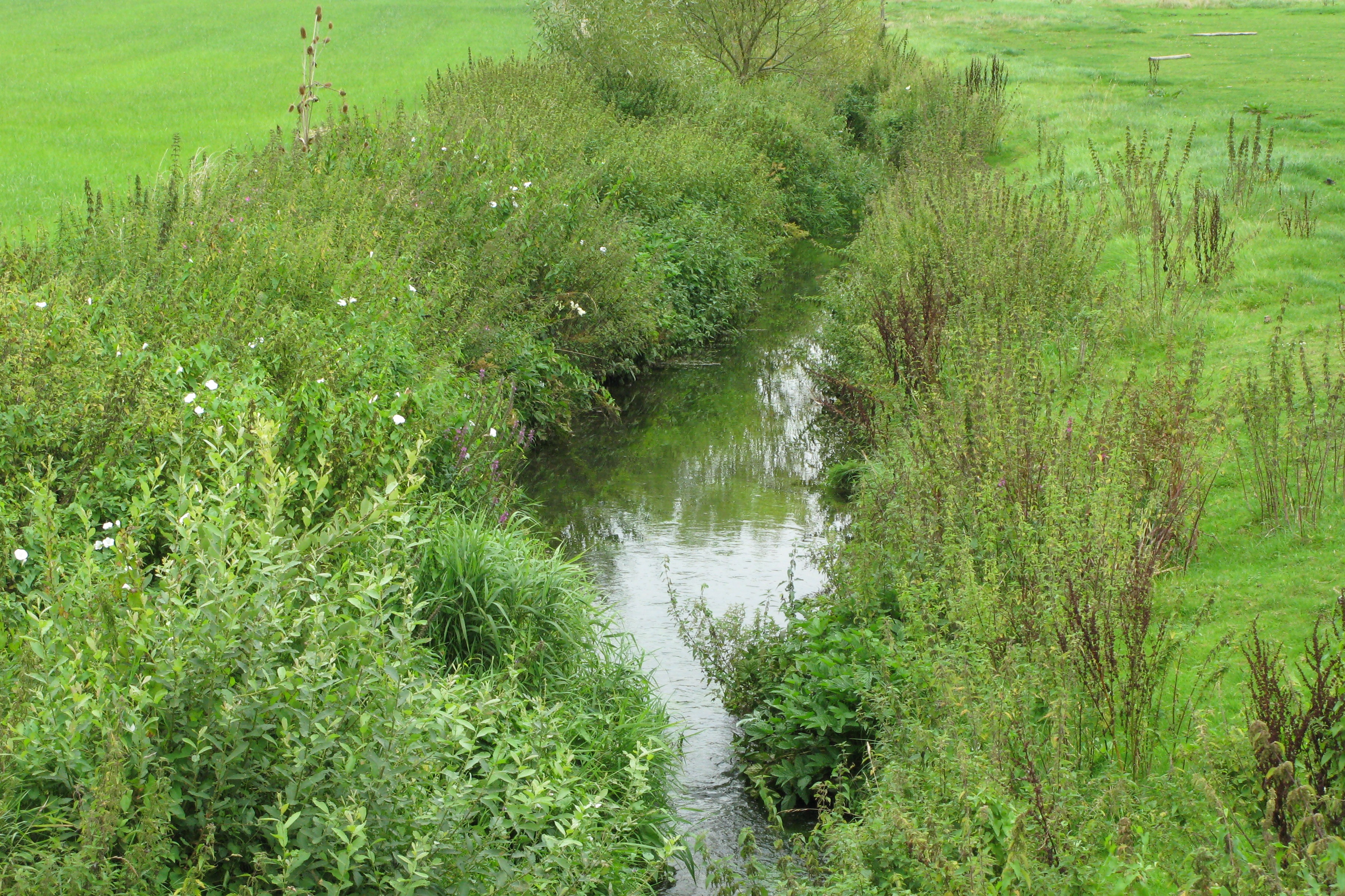 D'Schweebech tëscht der Uertschaft Schweebech a Schweebecherbréck. Kategorie:Baachen zu Lëtzebuerg